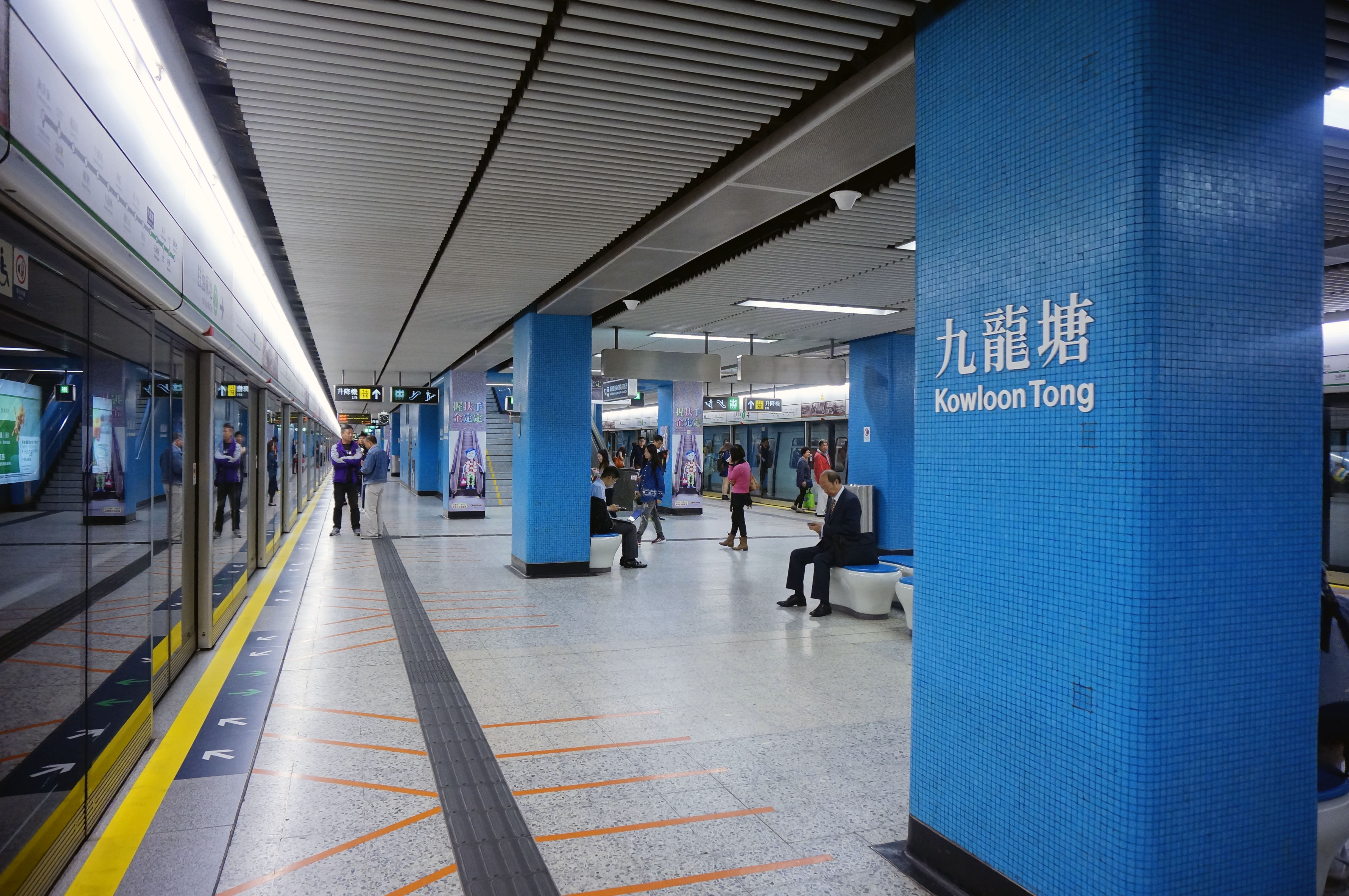 港鐵九龍塘站月台